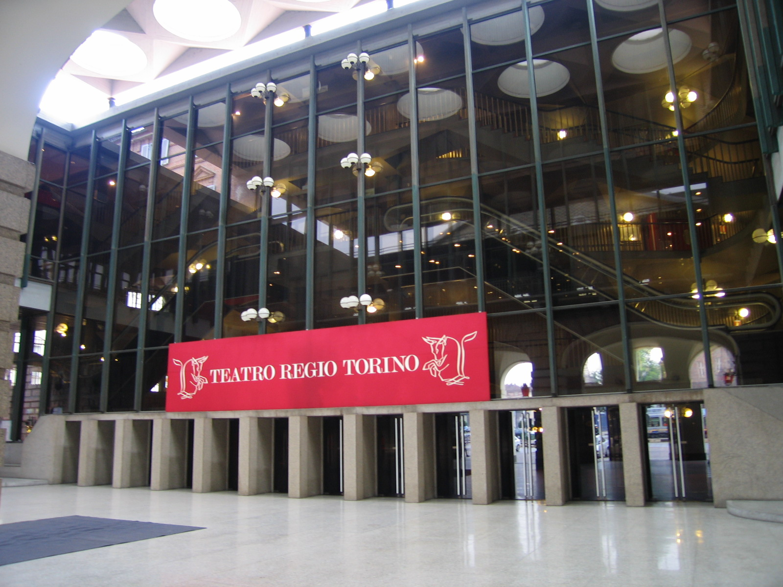 L'entrata principale del Teatro Regio a Torino.